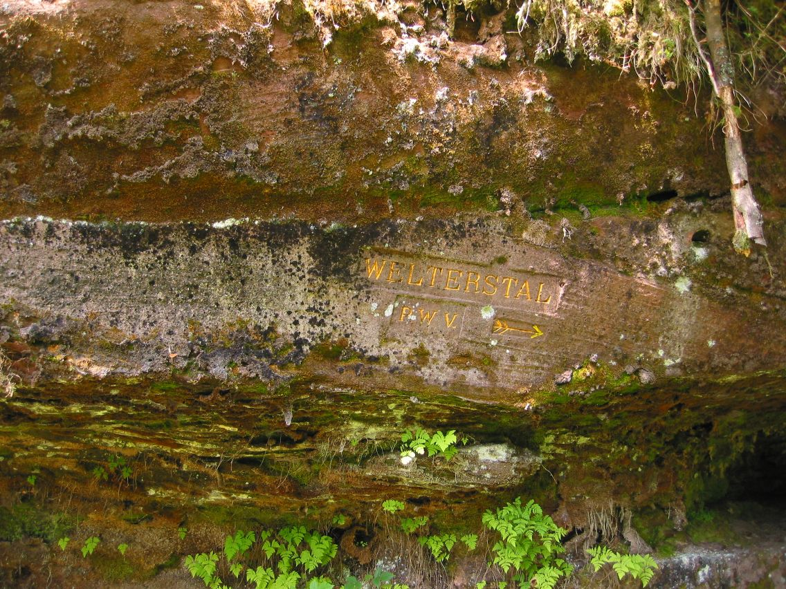 Ritterstein Nummer 109, Welterstal